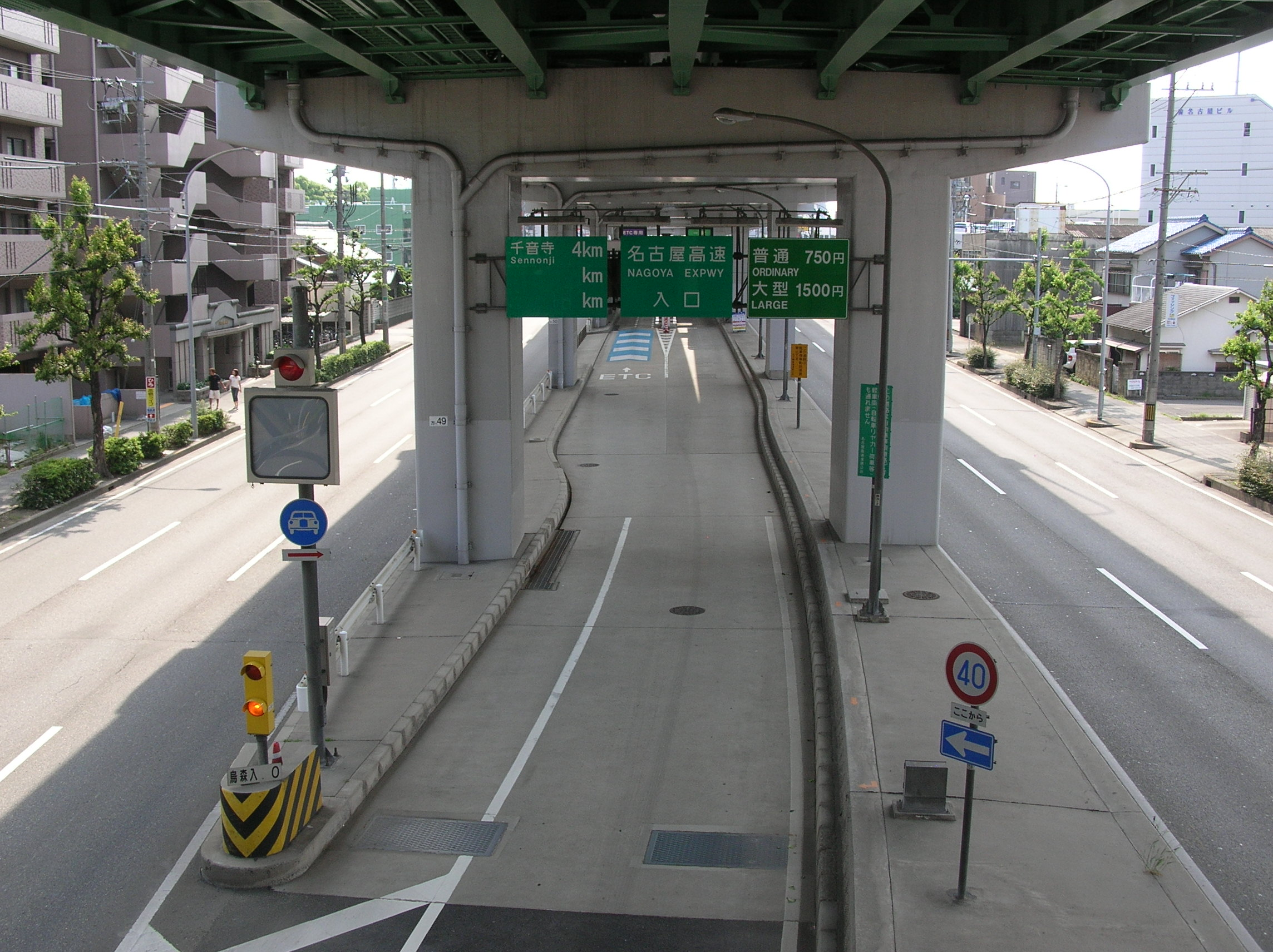 名古屋高速5号万場線 烏森入口